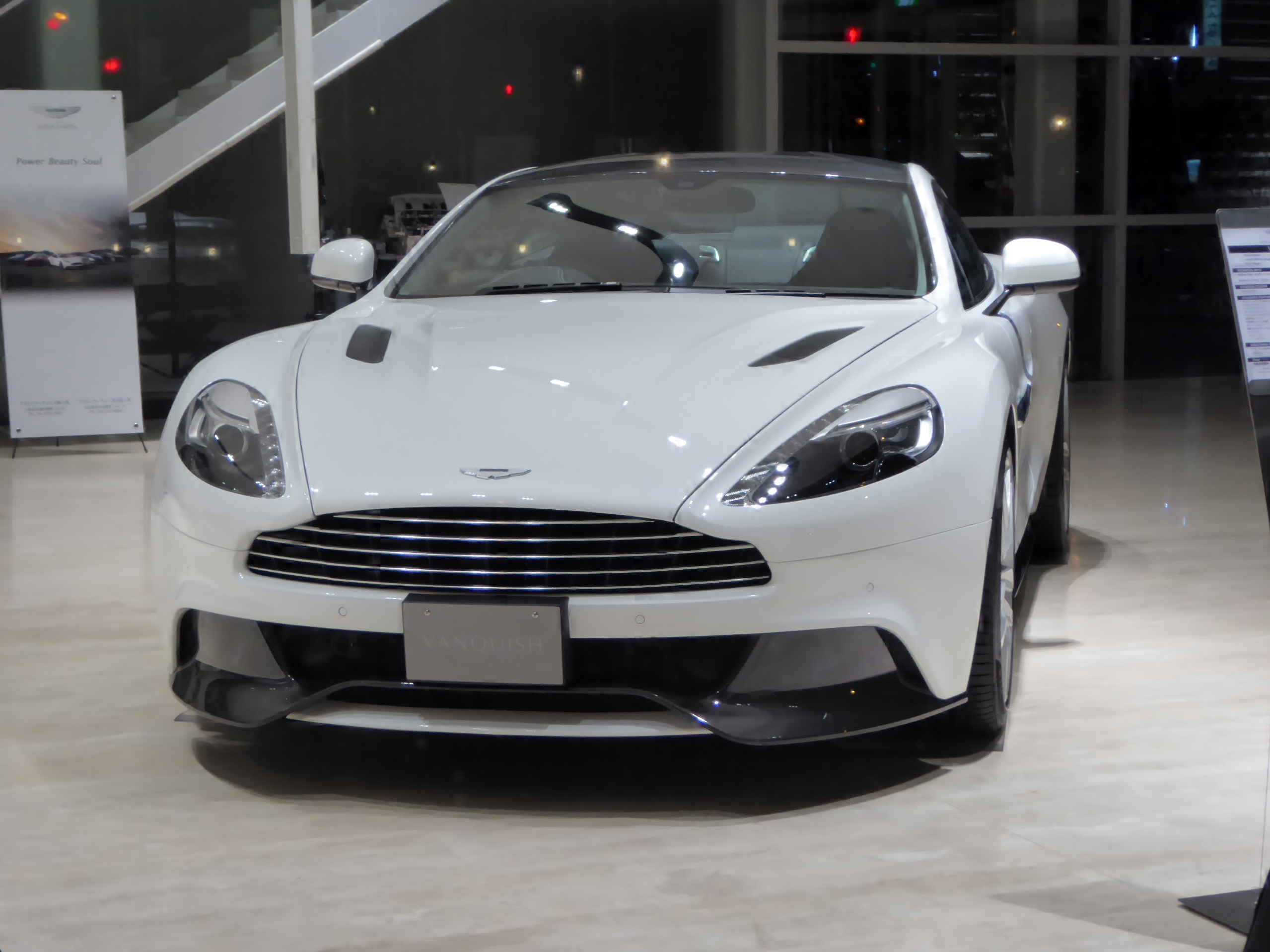 アストンマーチン・ヴァンキッシュをフロントから撮影。